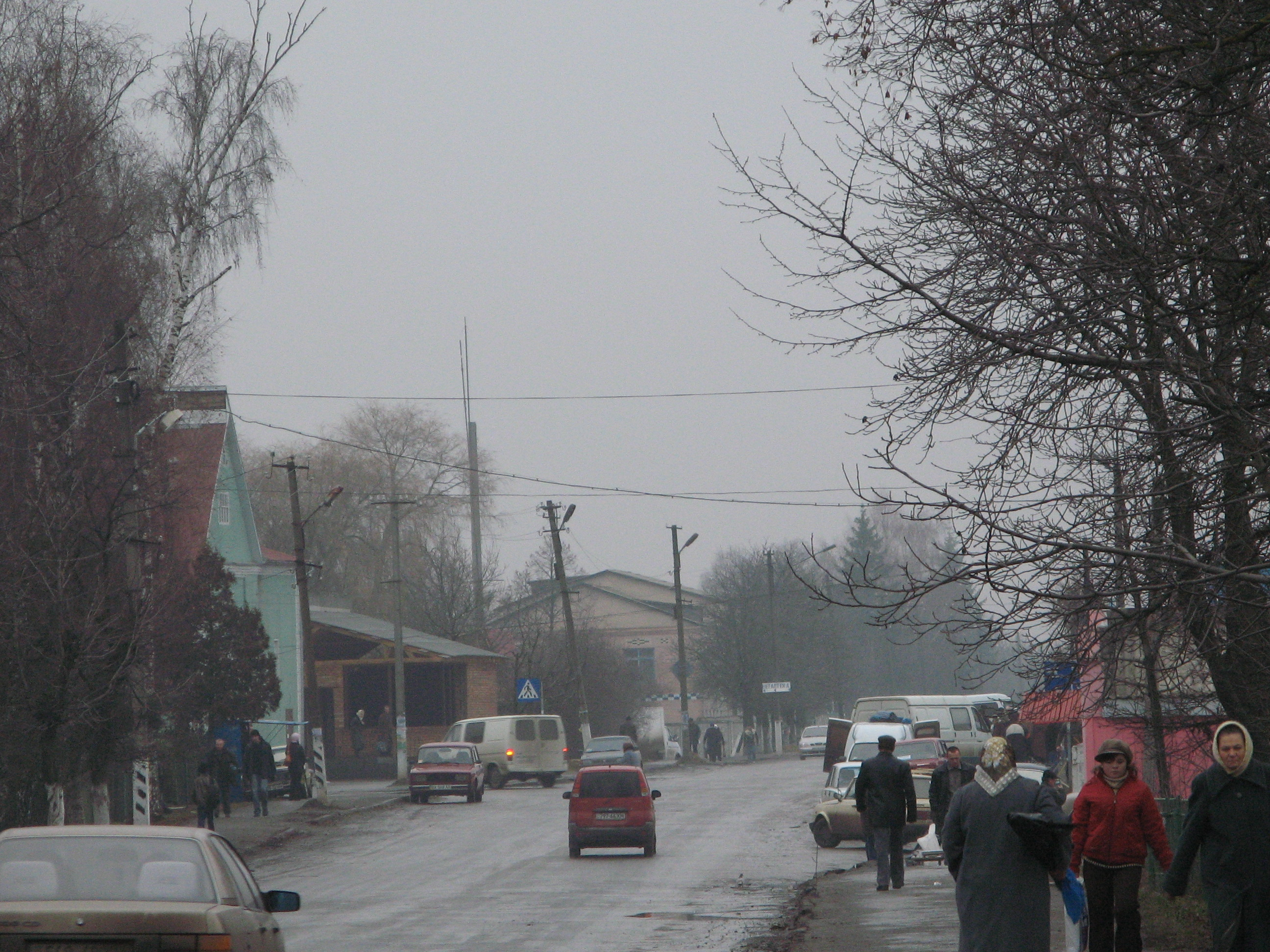 Jarmolińce - ulica Czapajewa przy kościele Piotra i Pawła, 24.11.2006 Autor: Krzys L